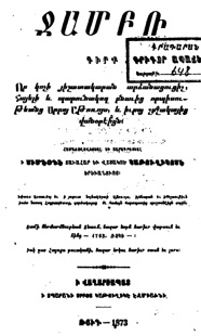 Обложка издания труда армянского ученого и церковного деятеля Симеона Ереванаци «Джамбр»